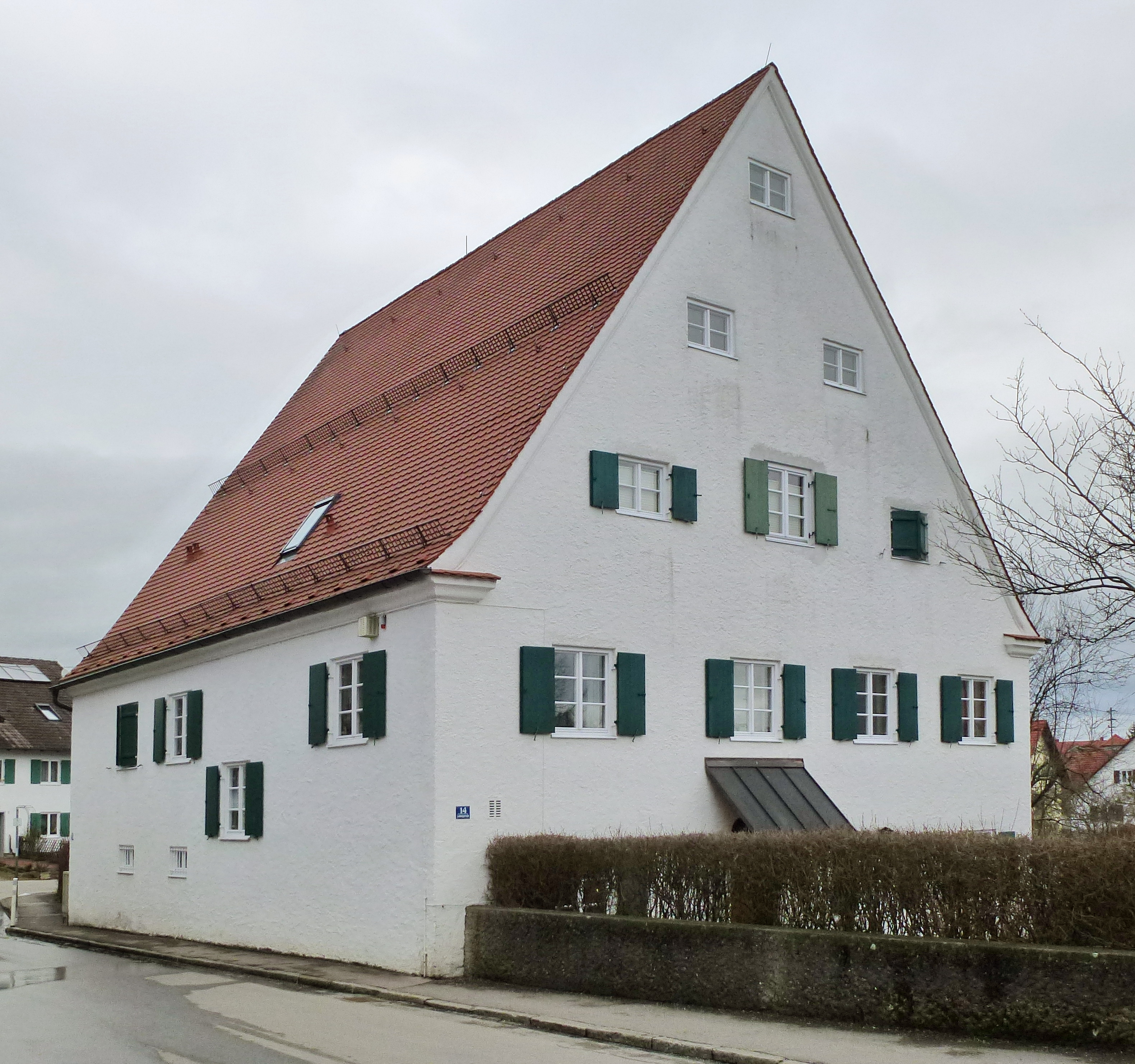 Utting, Ludwigstr14, Kath Pfarrhaus. Ansicht von SW